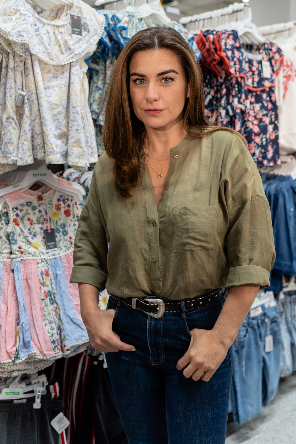 Ingriz Cruz durante la filmación de un comercial en 2018